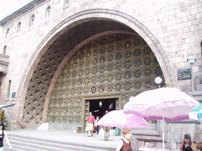 mercado yerevan